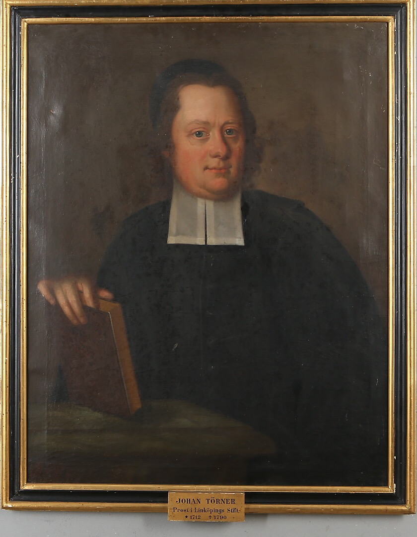 Porträtt av prosten Johan Törner (1712-1790), präst i Linköpings stift.